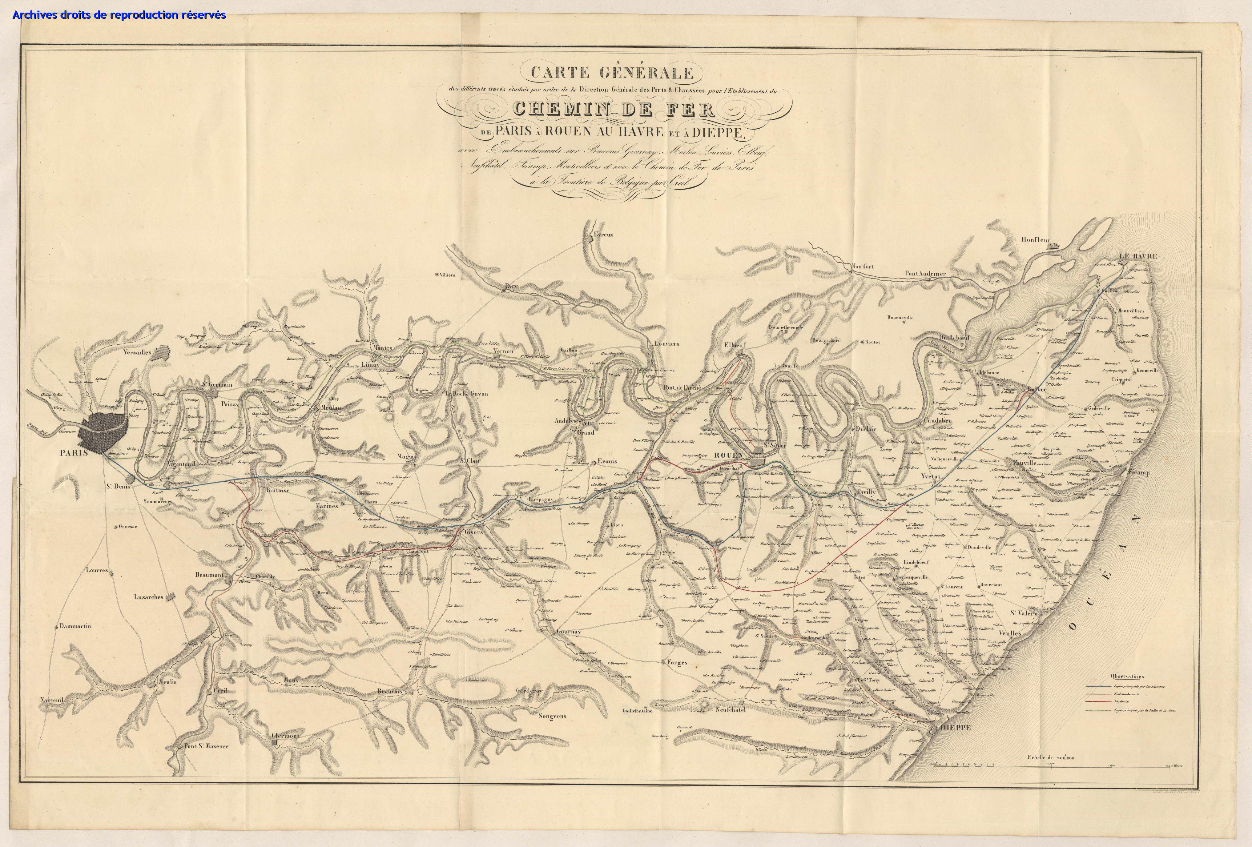 Titre : Carte générale des différents tracés étudiés par ordre de la Direction Générale des Ponts et Chaussées pour l'établissement du chemin de fer de Paris à Rouen, au Havre et à Dieppe. Auteur(s) : Thierry frères, lithographe à Paris Date : 1850/1899 (NB erreur 1836) Période : 18.. Lieu : France Pays : France Note : éch . 1/200 000. Cote : 1FI3_FRANCE_0027 Identifiant : Collection: Bibliothèque numérique du Périgord Fonds iconographiques : Cartes et plans Droits : Archives départementales de la Dordogne Source : Archives départementales de la Dordogne